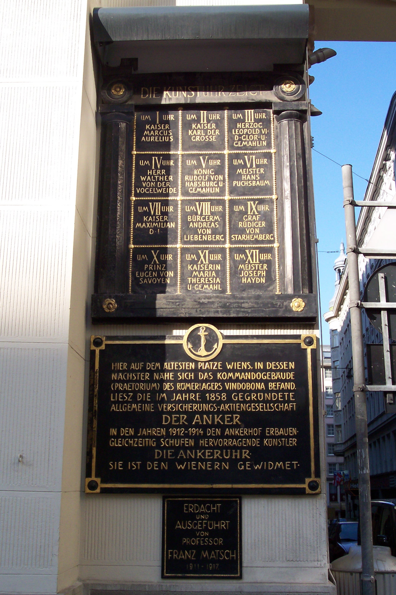 Die Tafel zeigt an, was die Ankeruhr spielt